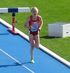 Młodzieżowe Mistrzostwa Europy w Lekkoatletyce U23 w Bydgoszczy 13-16 lipca 2017, biegu na 3000 m z przeszkodami kobiet